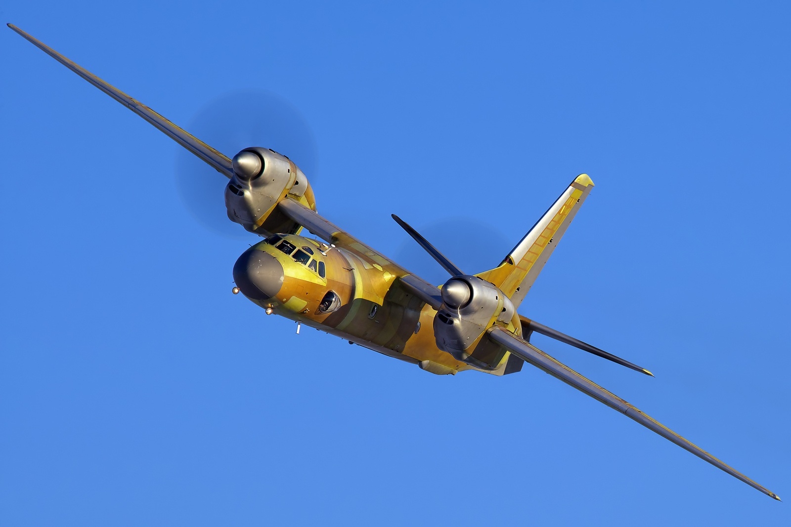 Antonov An-32B (cn 36-05) The 2nd An-32 for Iraqi Air Force is being tested